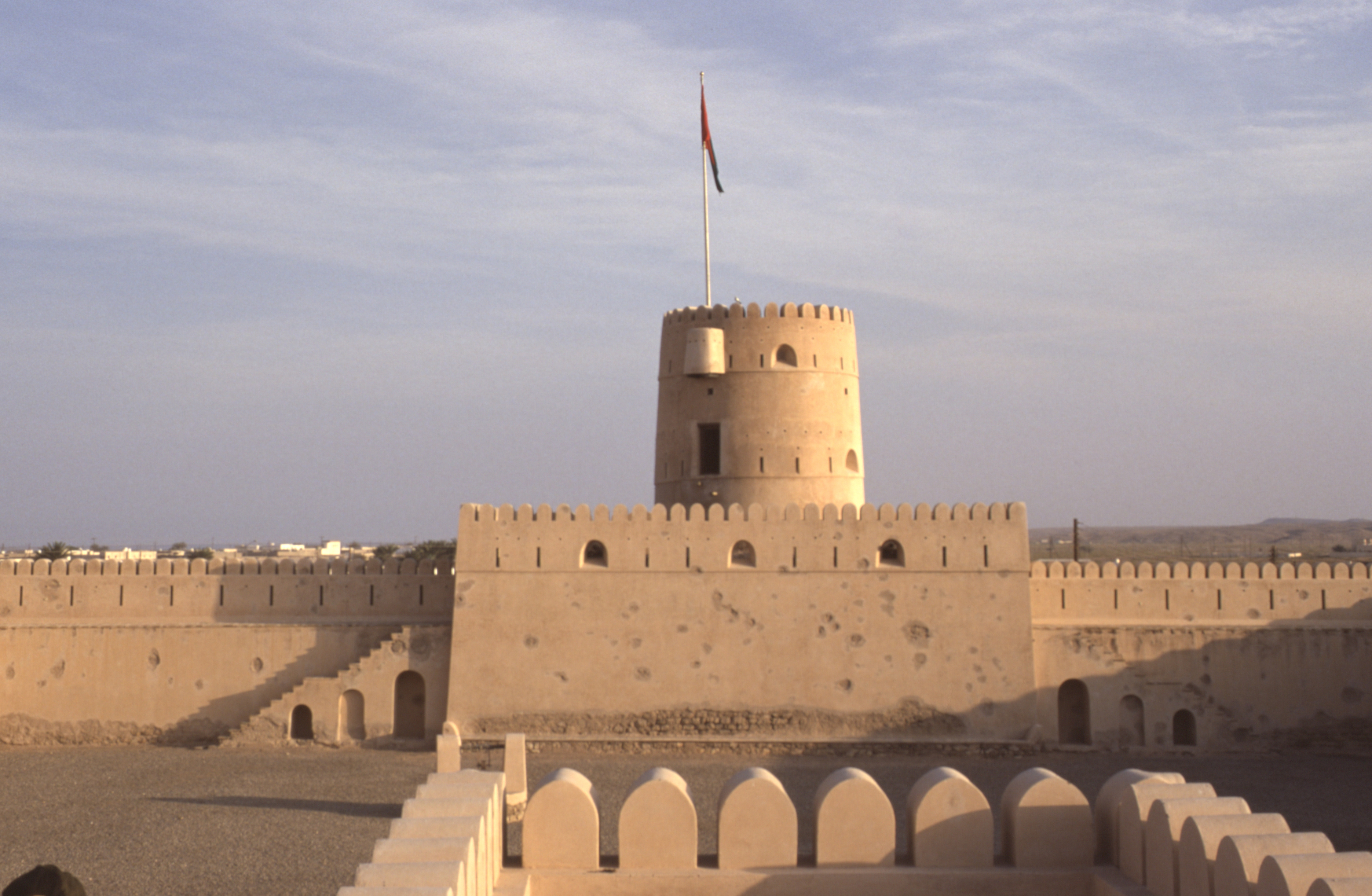 Fort von Ra's al-Hadd im Oman, Februar 2001